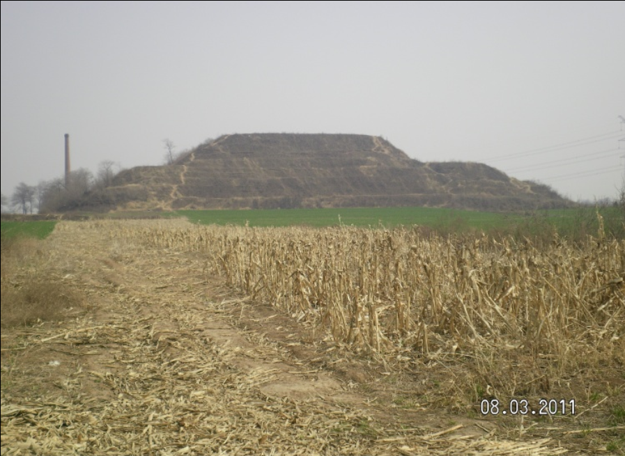 位于西安南郊的少陵塬上